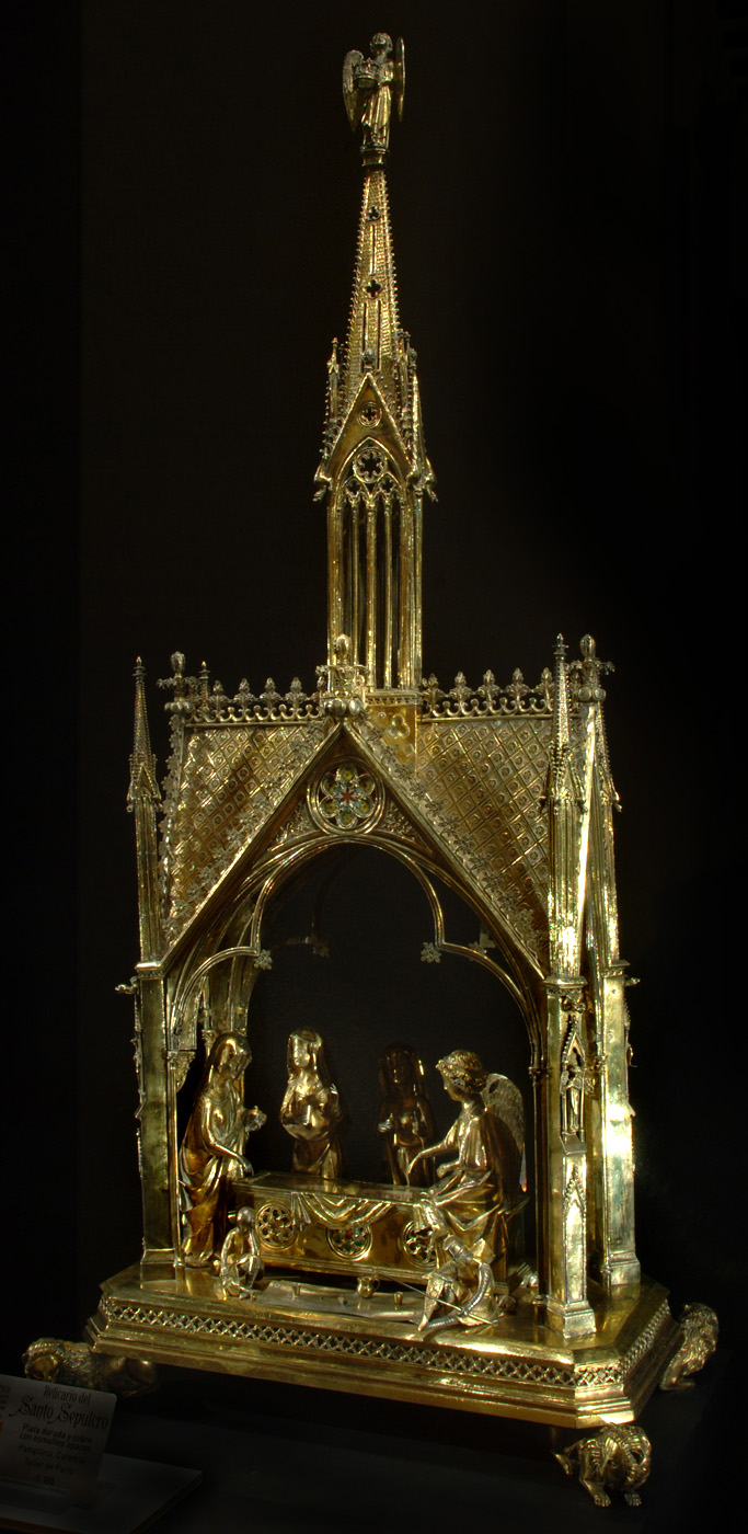 relicario santo sepulcro pamplona